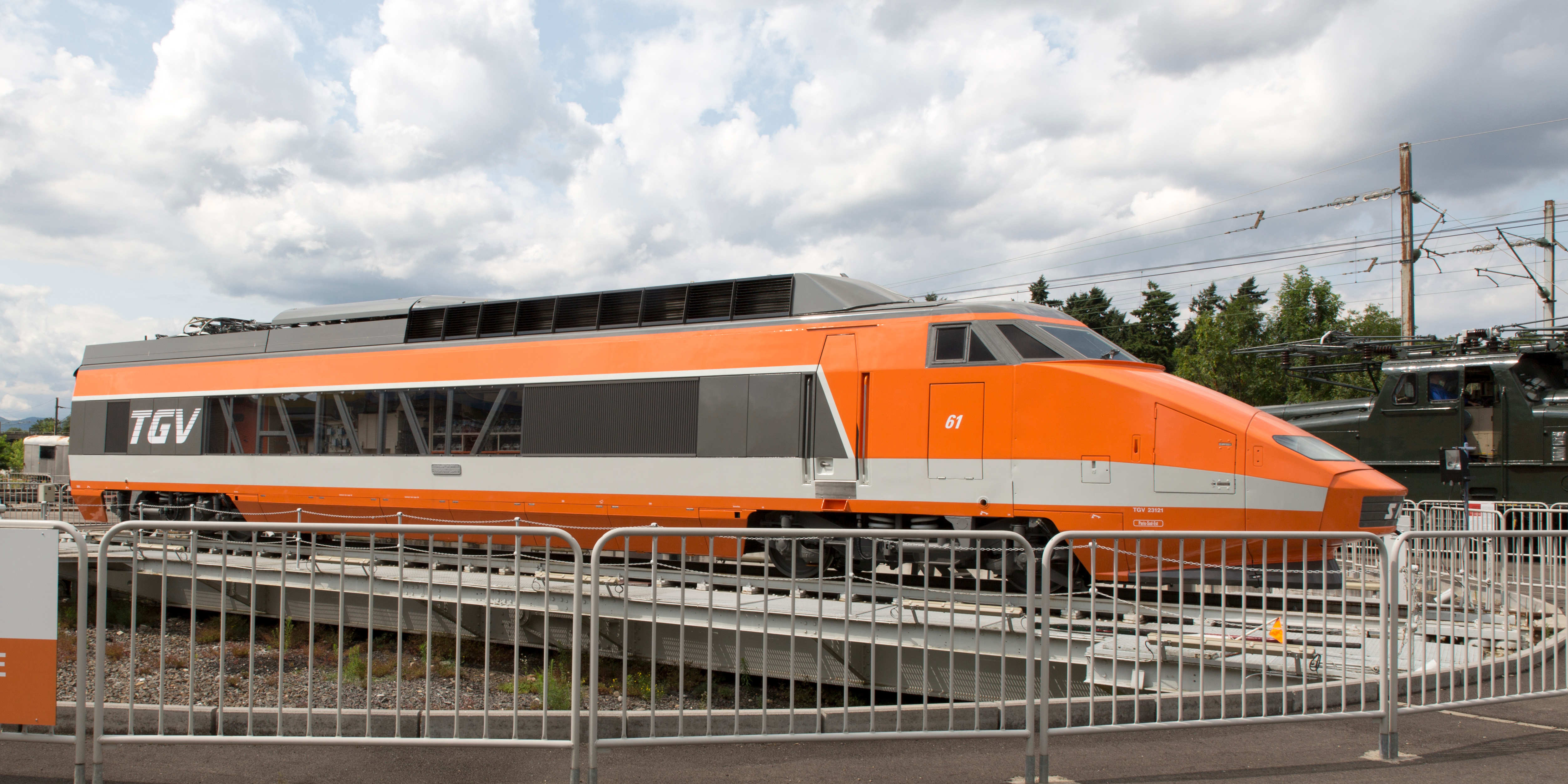 Motrice TGV Sud-Est N° 23121